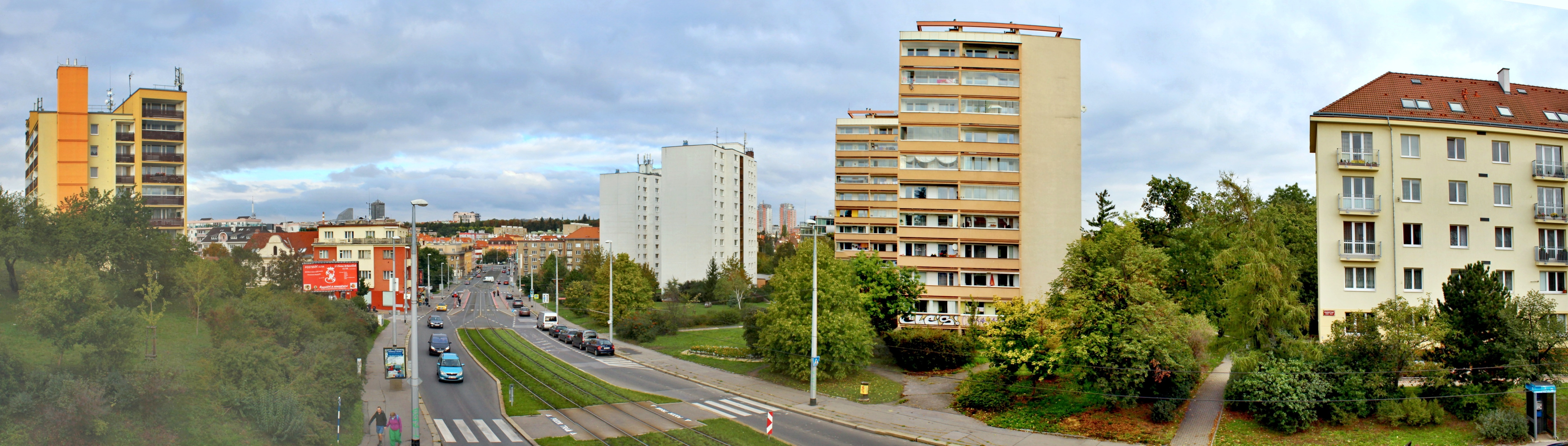 Průběžná ulice ve Strašnicích